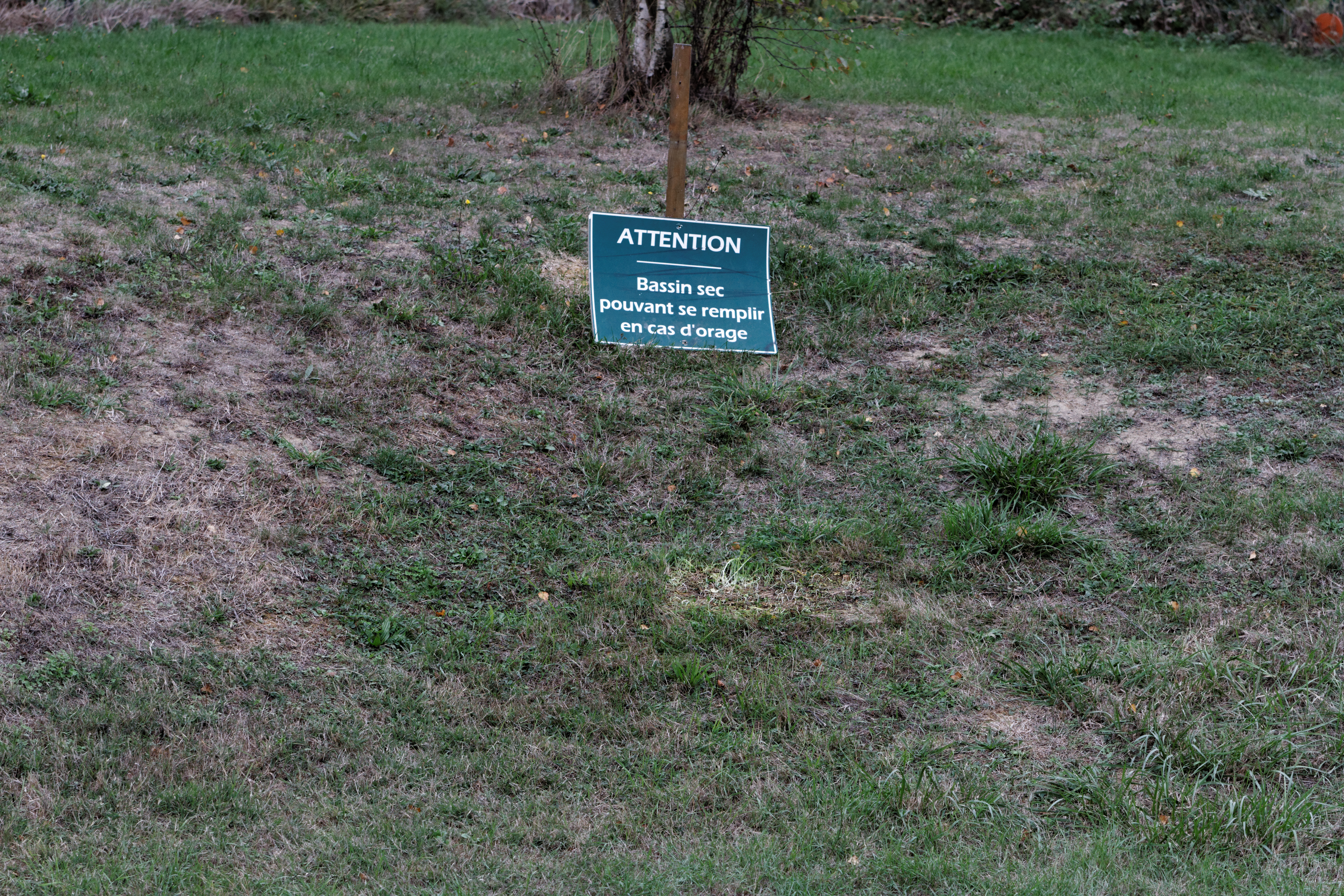 Montreuil-en-Touraine durant l'Opération Libre.